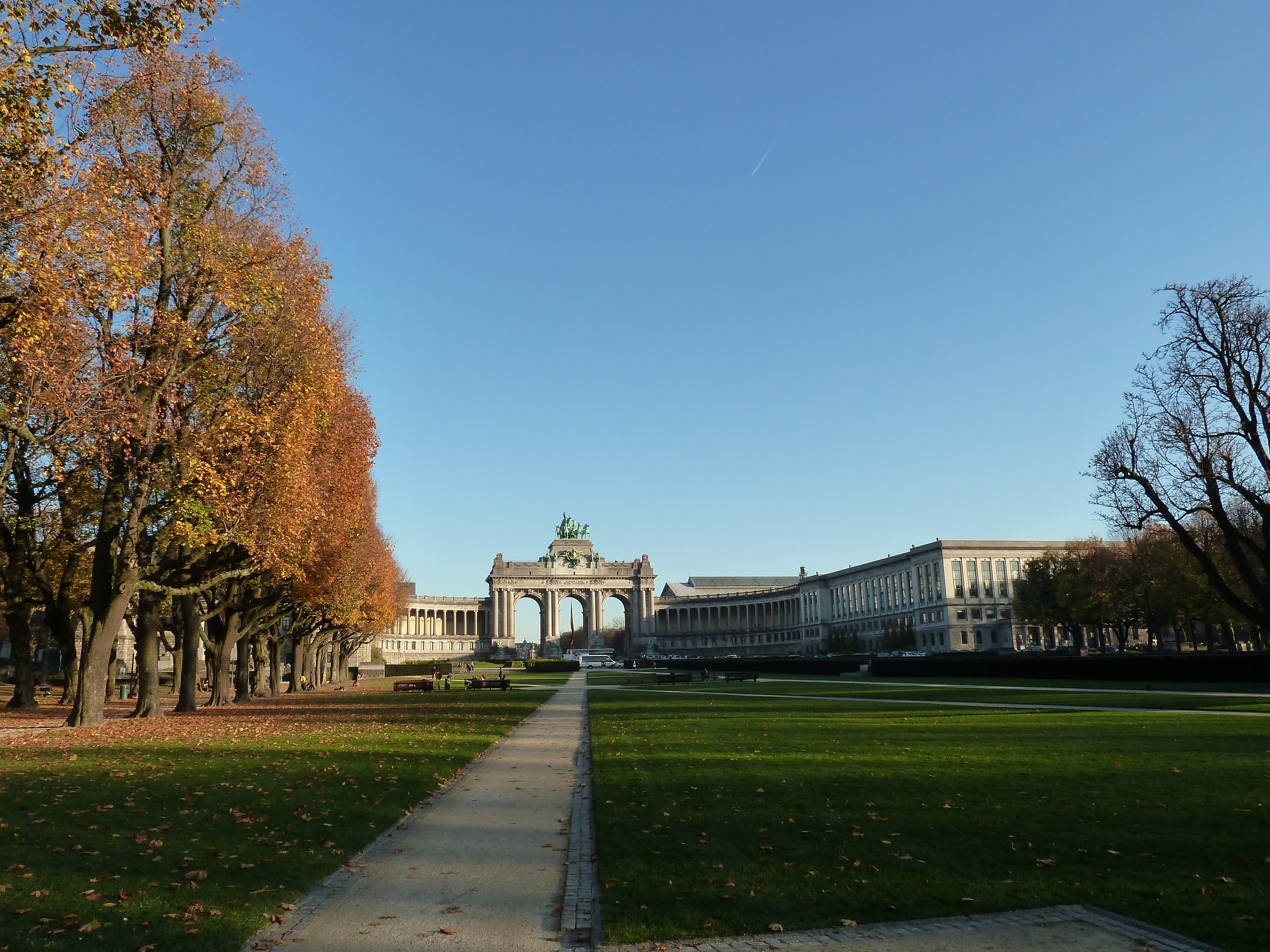 Derrière la remise des prix: Parc du Cinquantenaire, Bruxelles